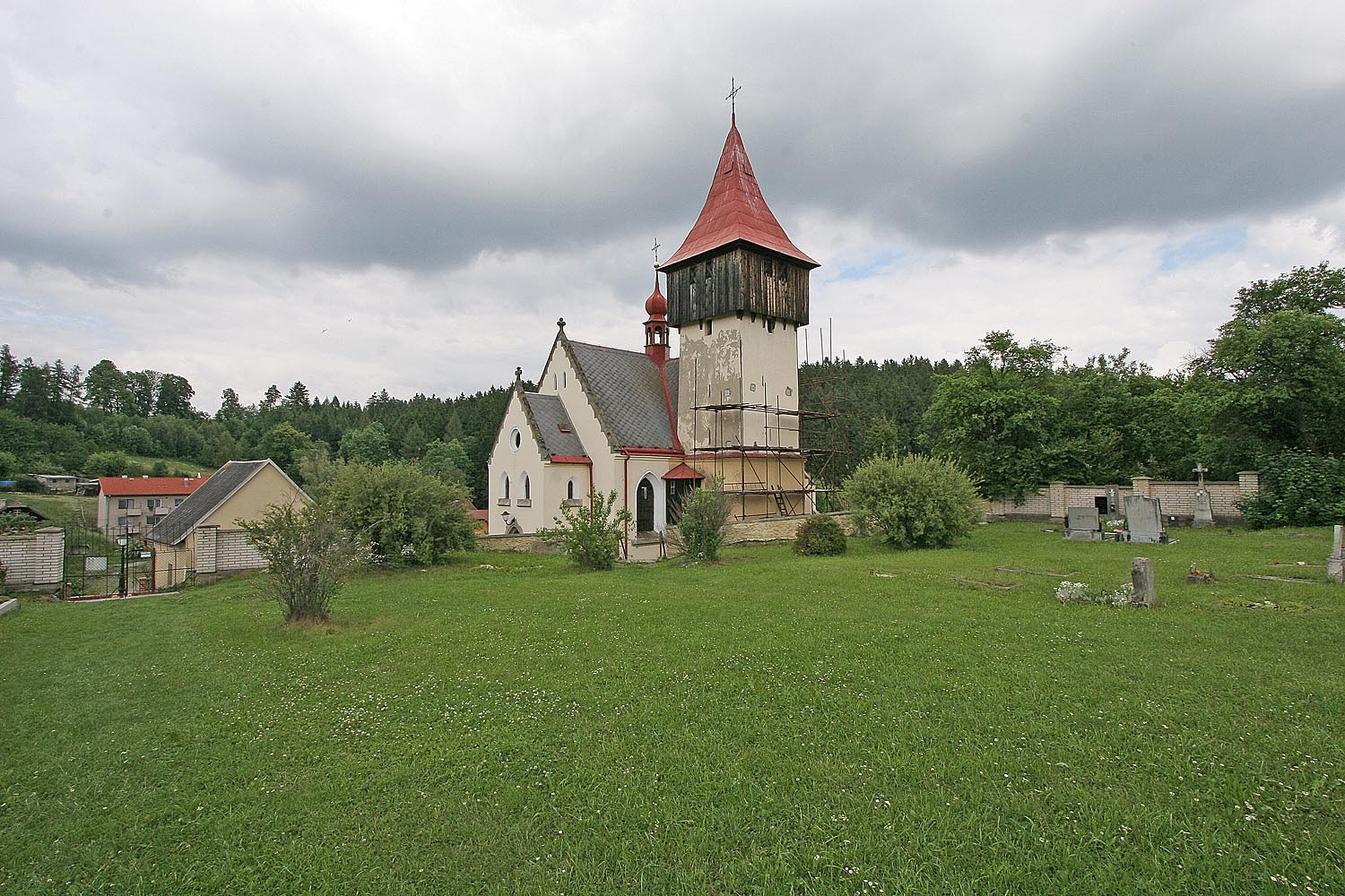 Kostel Svaté Kateřiny ve Vítějevsi